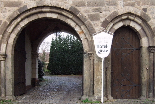 Kommende Ramersdorf, Mittelalterliches Portal